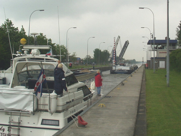 zelf gemaakt op 2/6/2005 (я!k)